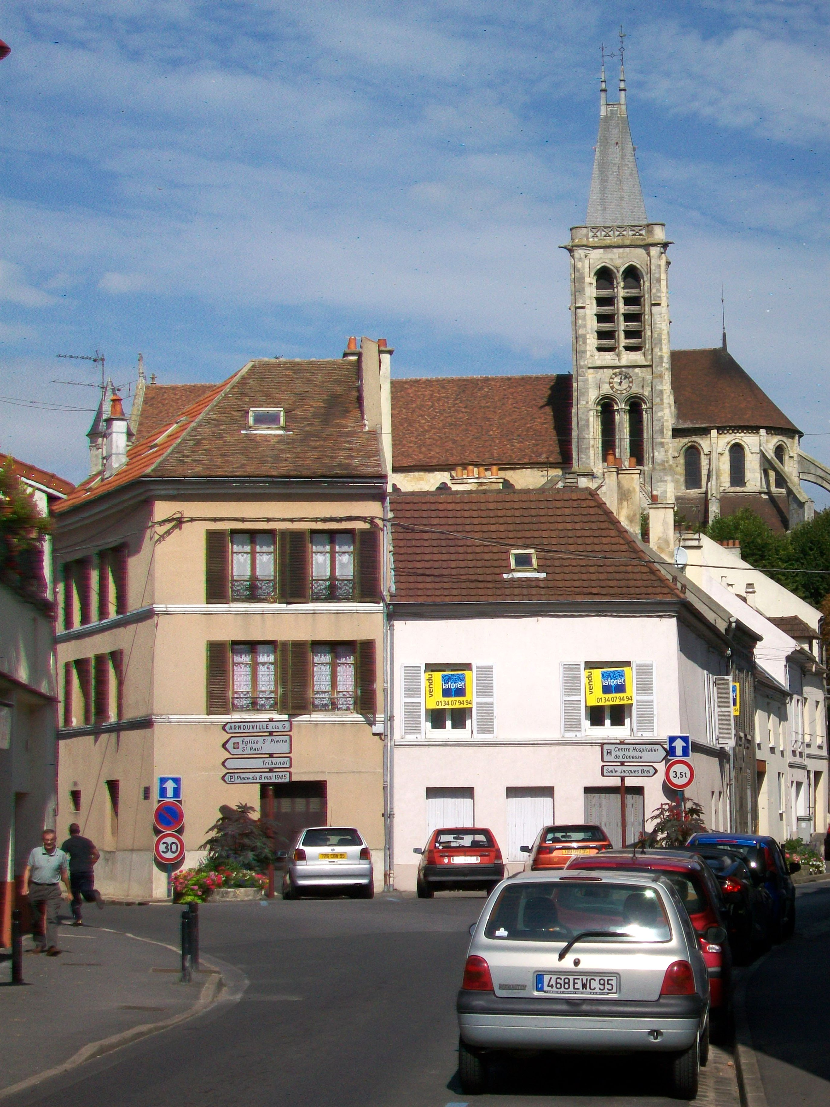 Vue sur l'église depuis le sud, rue de l'Hôtel-dieu : le plus que l'on prend du recul, le plus la nef devient visible. De près, une vue d'ensemble de la nef n'est pas possible en raison des maisons qui s'en rapprochent.